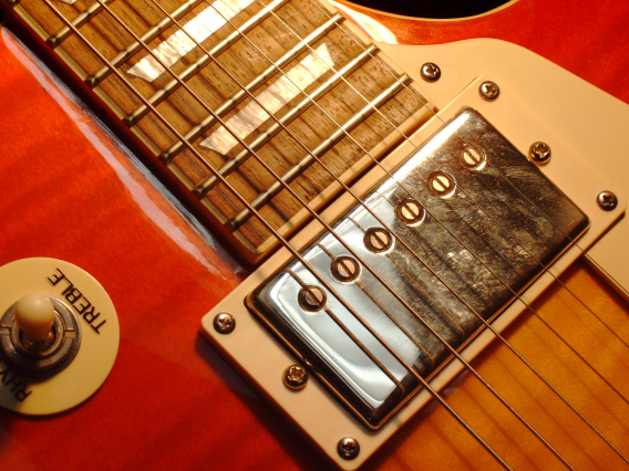 Gibson Les Paul Standard, Detail